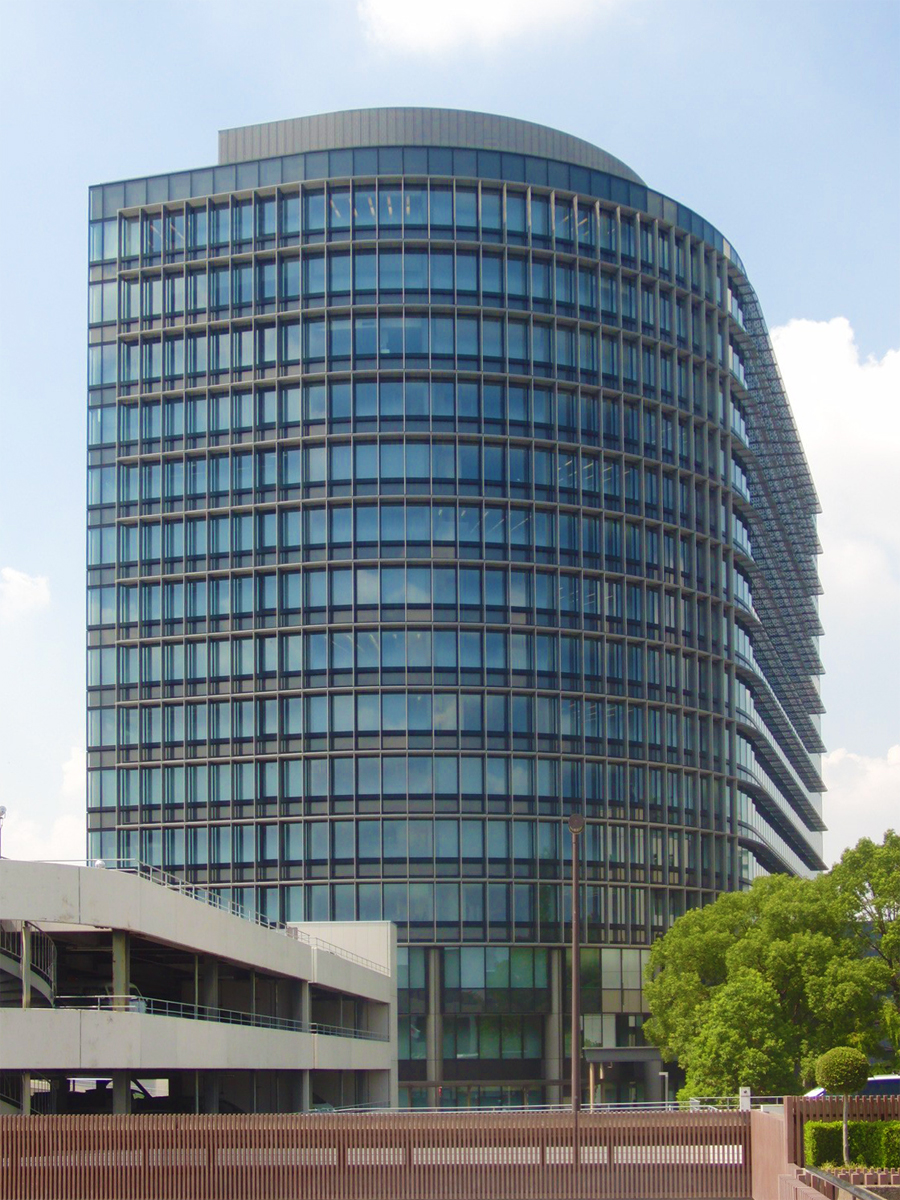 トヨタ自動車本社を撮影